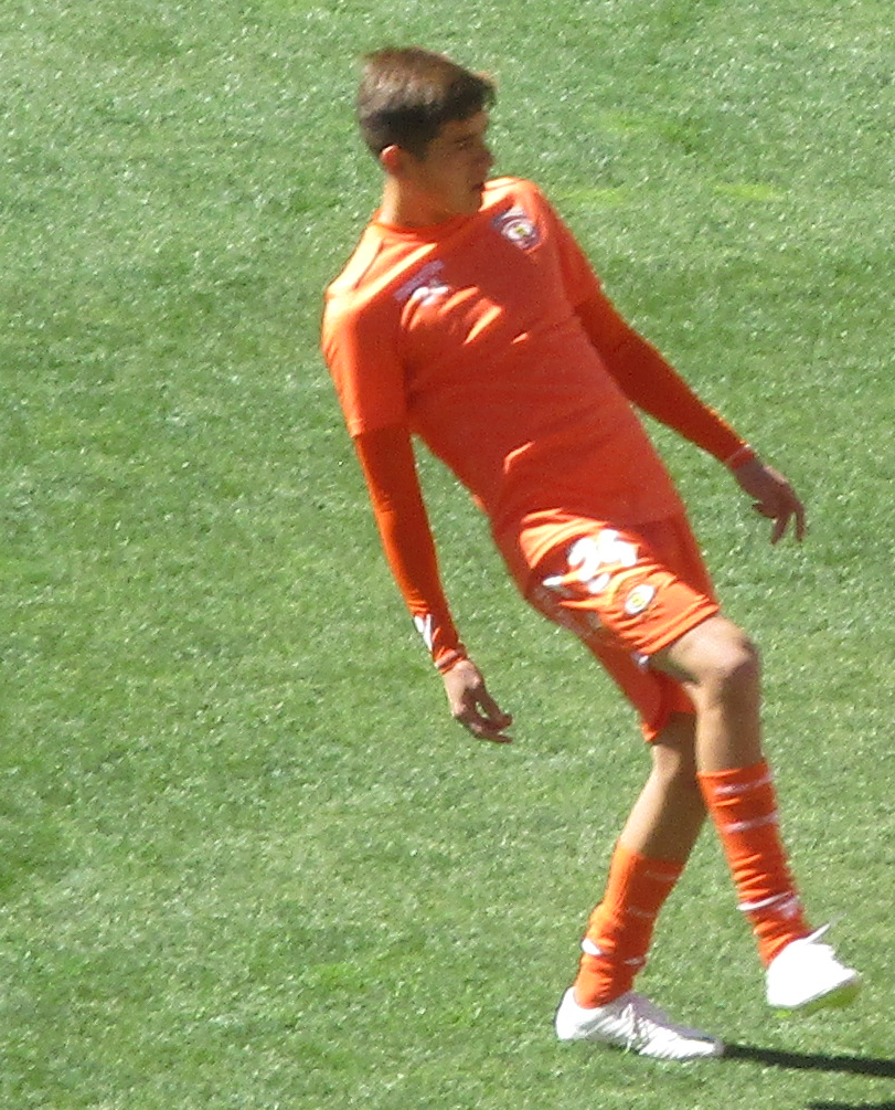 Jugador de fútbol Axl Rios en ejercicios de calentamiento previo a disputar un partido con Cobreloa en la Primera B de 2018